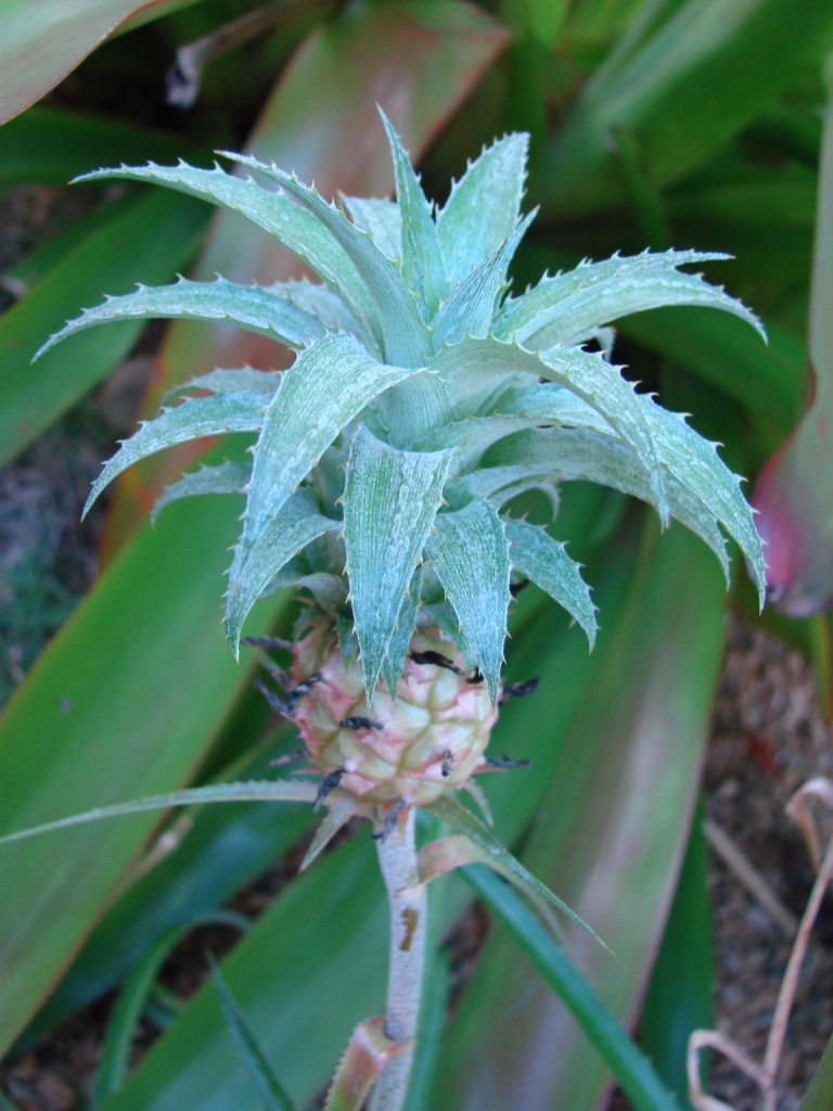 Ananas ananassoides - BROMELIACEAE Brasília - Distrito Federal - Brasil.